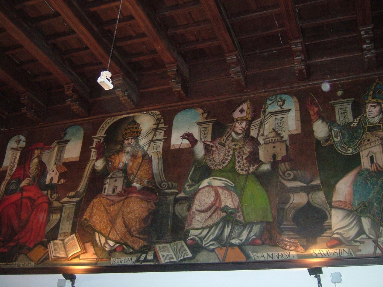 Murales de la Universidad de Osuna, España.